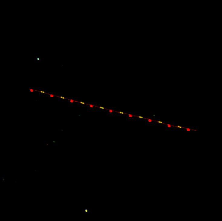 Während einer zehn Sekunden dauernden Langzeitbelichtung mit einem CMOS-Bildsensor mit Bayer-Mosaik aufgenommene Sternschnuppe der Perseiden. Der hell leuchtende Kopf der Sternschnuppe wurde während der gerasterten Belichtungen 17-mal von einzelnen Farbpixeln erfasst.